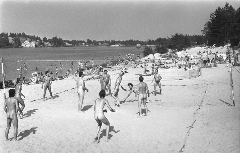 ADN-ZB / Weisflog / 24.7.82 / Bez. Cottbus: Gut besucht sind die fünf FKK-Strände des Bezirkes Cottbus. Zwei der schönsten Badestrände liegen am Senftenberger See. Dieses Erholungsgebiet im Zentrum des Lausitzer Kohlereviers lädt in diesem Jahr zum zehnten Mal zur Bade- und Urlaussaison ein. Glasklares Wasser bedeckt eine ehemalige Tagebaugrube. Information added by Wikimedia users.